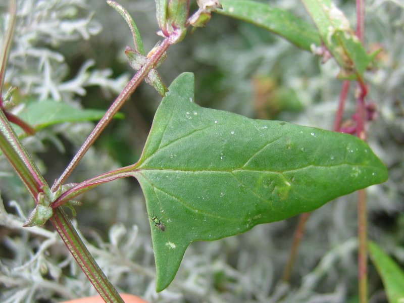 Spieß-Melde Atriplex prostrata, Wismarbucht